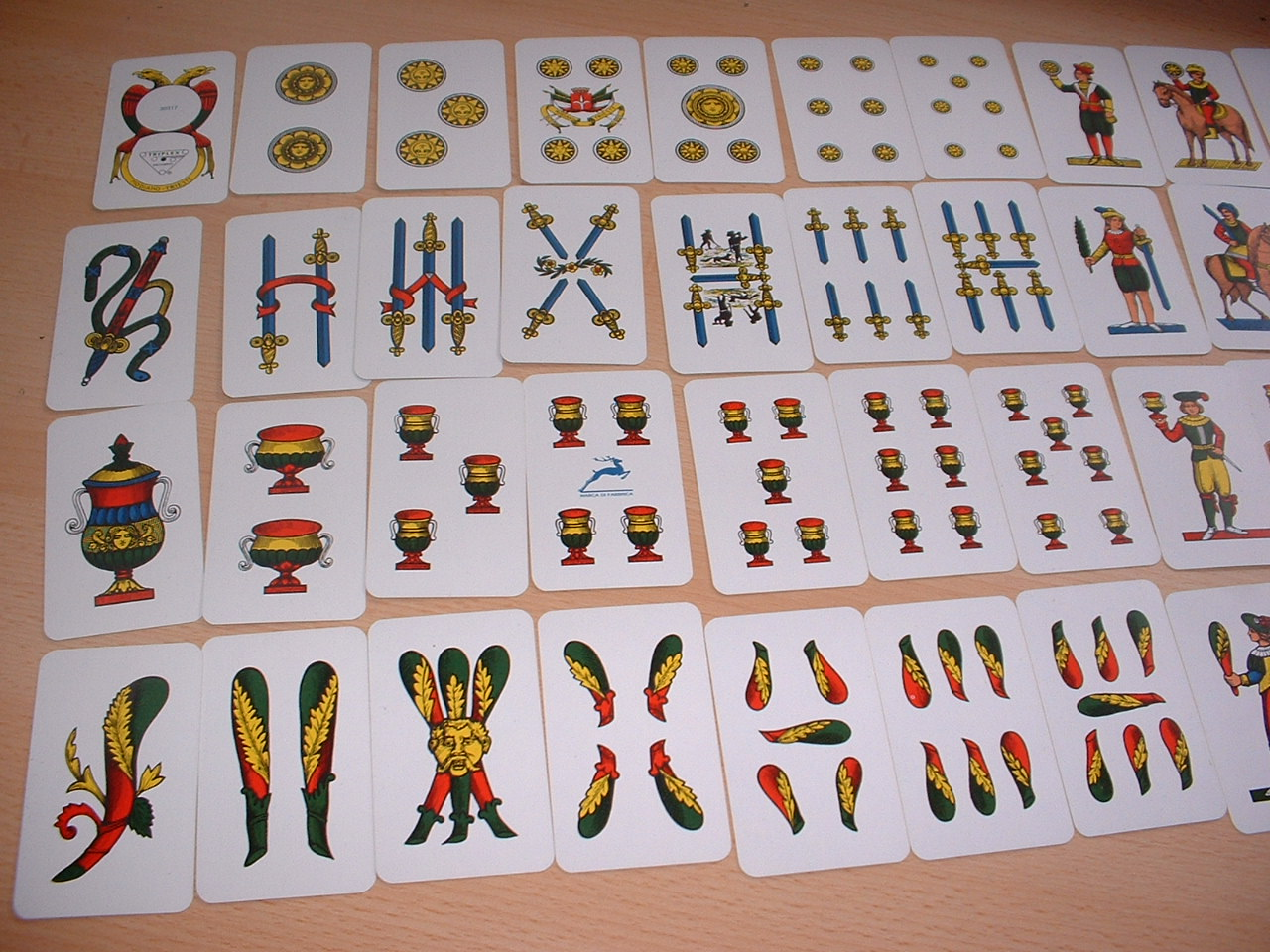 Set of Italian Modiano cards ("napoletane"), used to play scopa and other games. Photographed by me on 06-09-28. Mazzo di carte napoletane Modiano, usate per giochi tipici italiani come scopa, briscola ed altre.